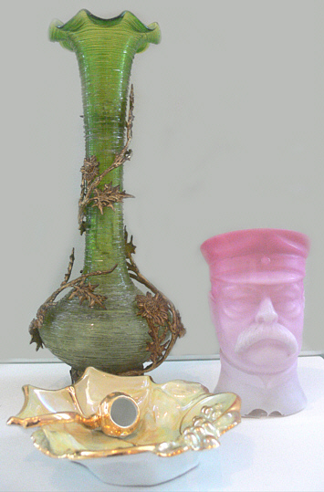 Drei Stücke aus Gustav Pazaureks Sammlung von „Geschmacksverirrungen“: links vorne: Aschenbecher, Porzellan/Lüsterglasur/Goldstaffierung, Anfang 20. Jh., Inv. Nr. GV 462 links hinten: Vase, Glas/Messingguss, Anfang 20. Jh., Inv. Nr. GV 531 rechts: Bismarck-Vase, Glas/Milchglasimitation gespritzt, Anfang 20. Jh., Inv. Nr. GV 233 Landesmuseum Württemberg (Außenstelle Museum für Volkskultur in Württemberg, Waldenbuch)